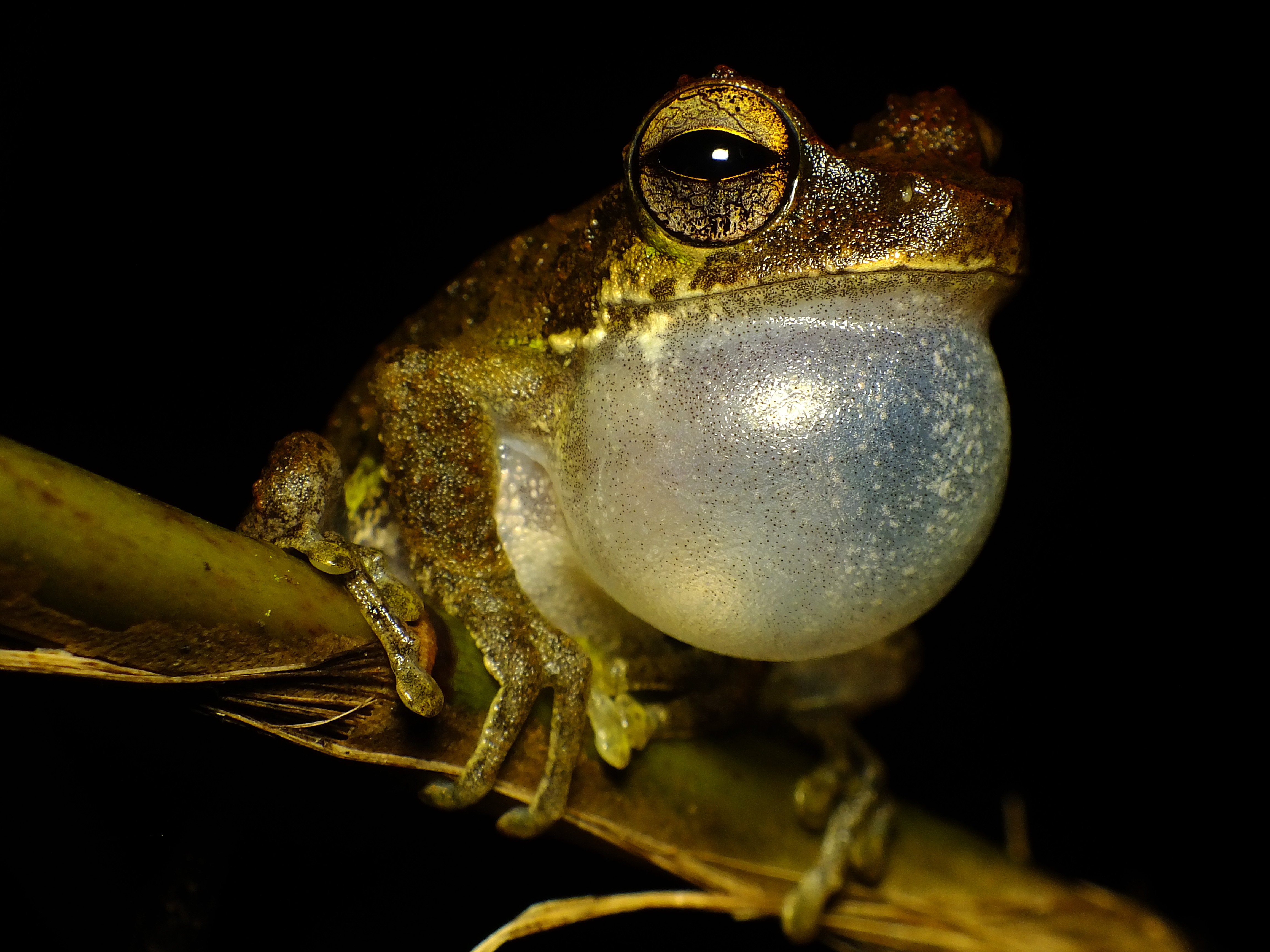 Seekor katak hijau di gunung Cyclops, Jayapura, Papua sedang memanggil individu katak lainnya.